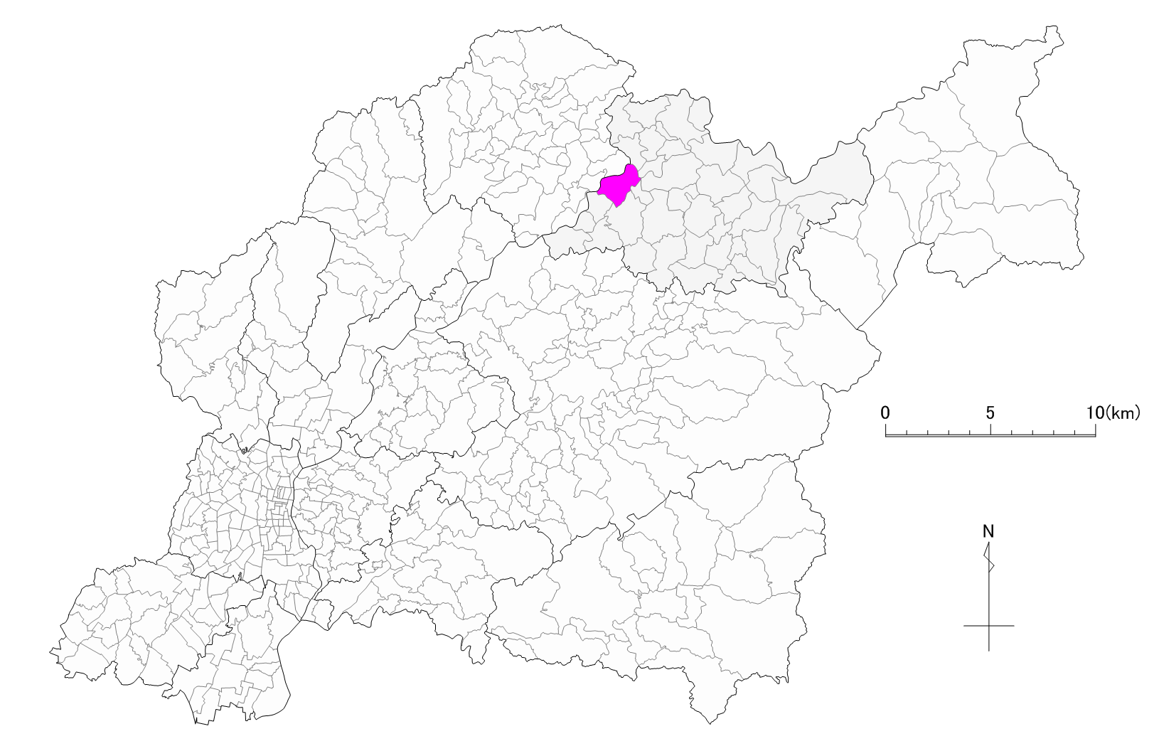 豊田市有間町位置図